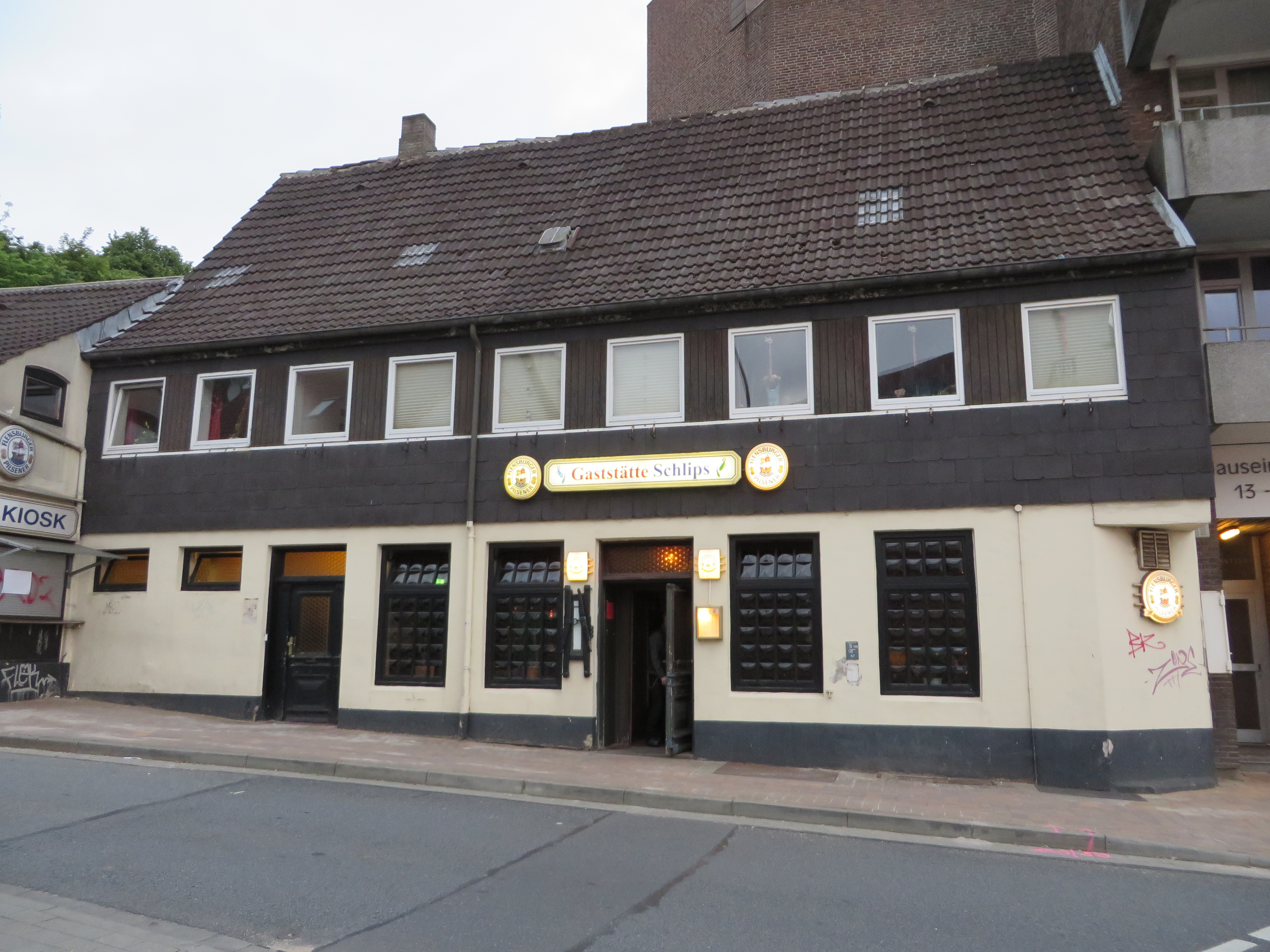 Gaststätte Schlips früher benannt nach dem Grönen Keel (Flensburg 2014), Bild 001